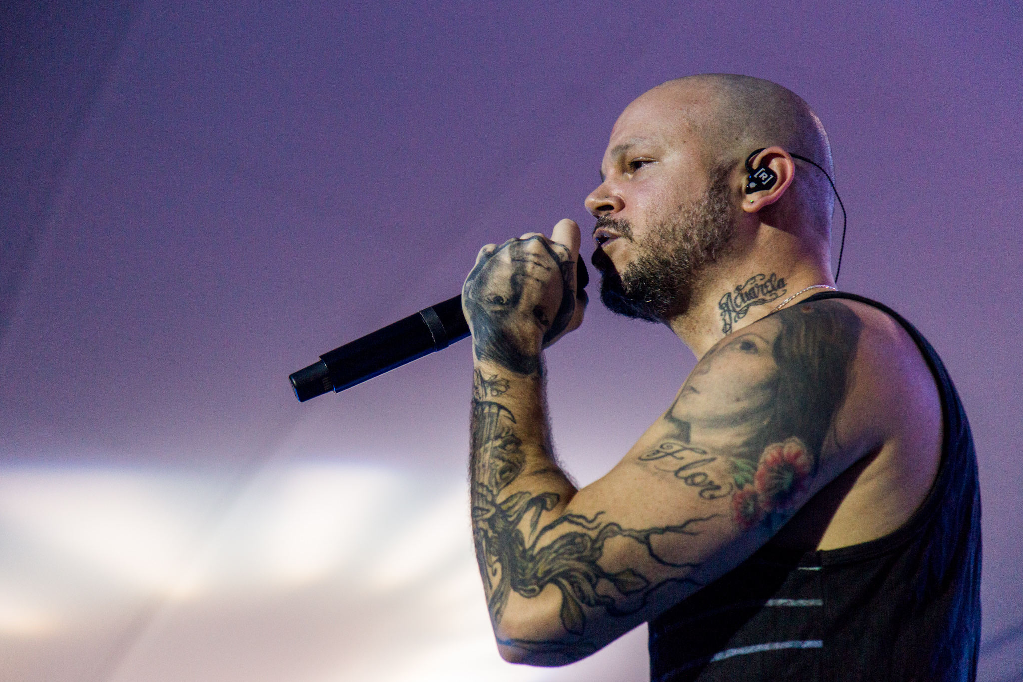 Concierto de Residente en el Festival MUPA 2019 en Panamá.